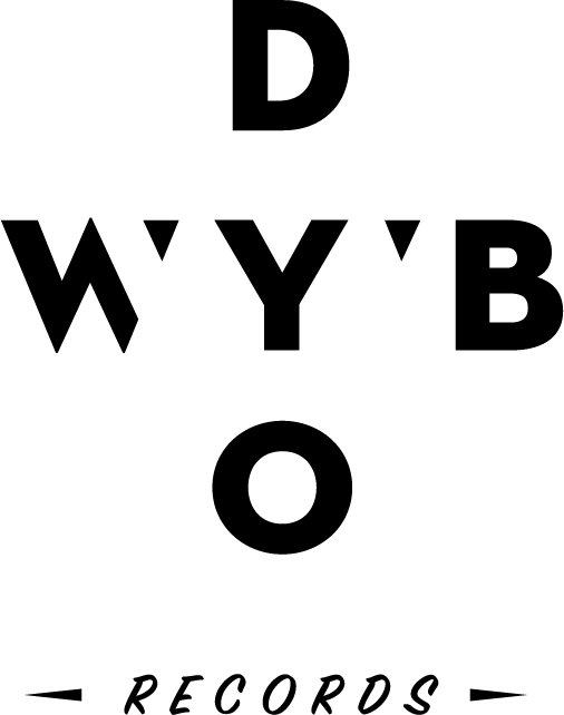 Logoen til plateselskapet Die With Your Boots On Records.